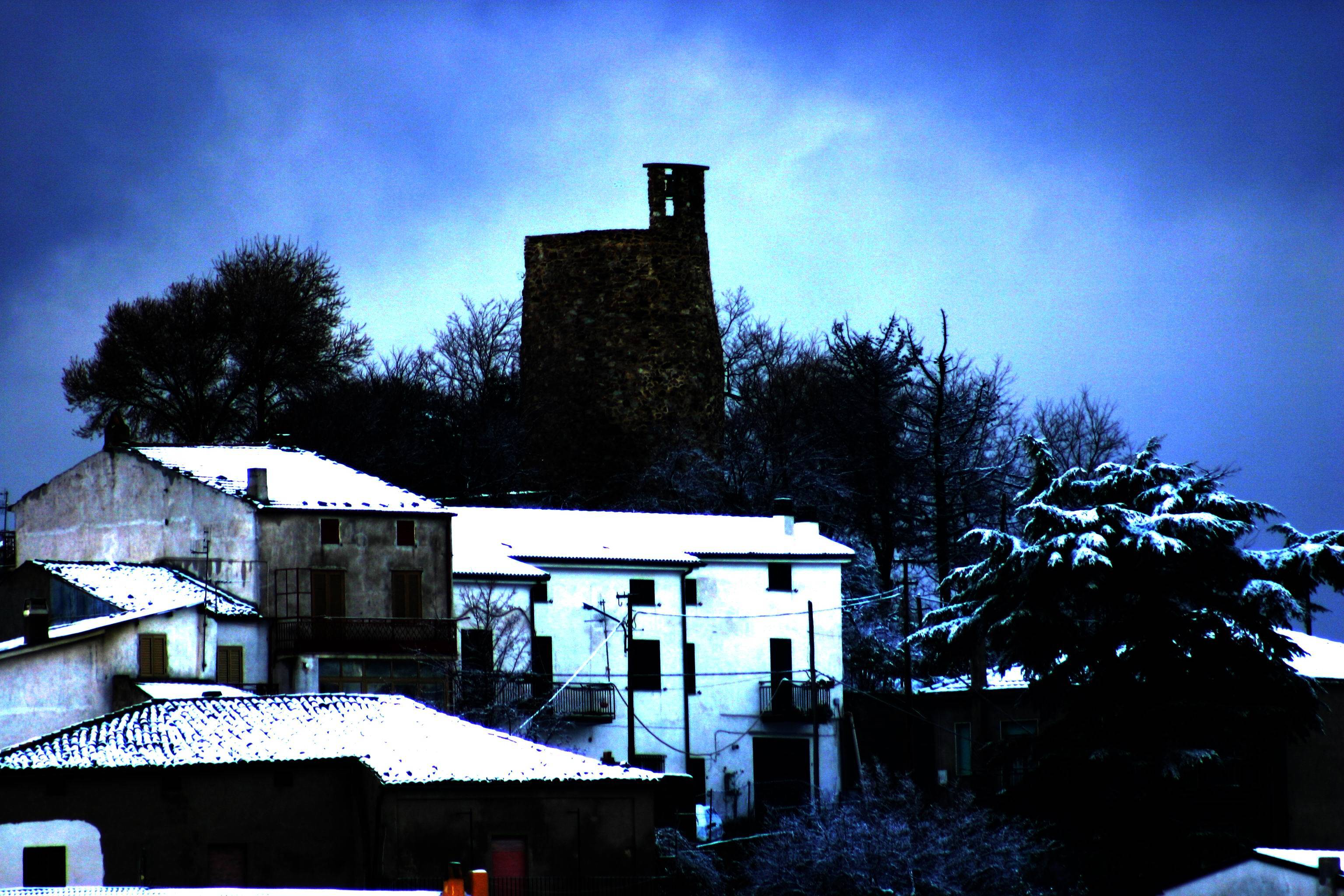 Foto notturna di una della delle torri del l'antico Castello di Acri di probabile epoca bruzia detto (Rocca dei Bruzi)